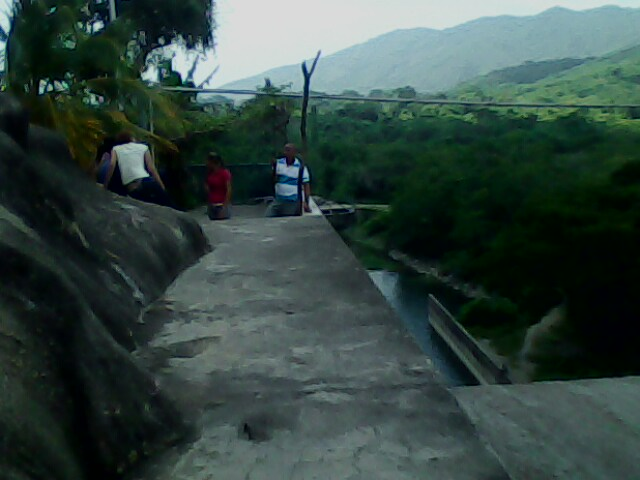 Vista de la Cresta del Embalse de Cumaripa, Yaracuy, Venezuela.